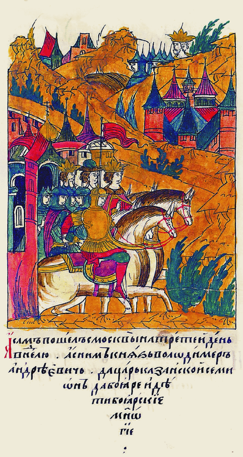 Лицевой летописный свод "...а сам пошел из Москвы на третий день, в воскресенье, а с ним князь Владимир Андреевич да царь Казанский Симеон, да бояре и дети боярские многие".